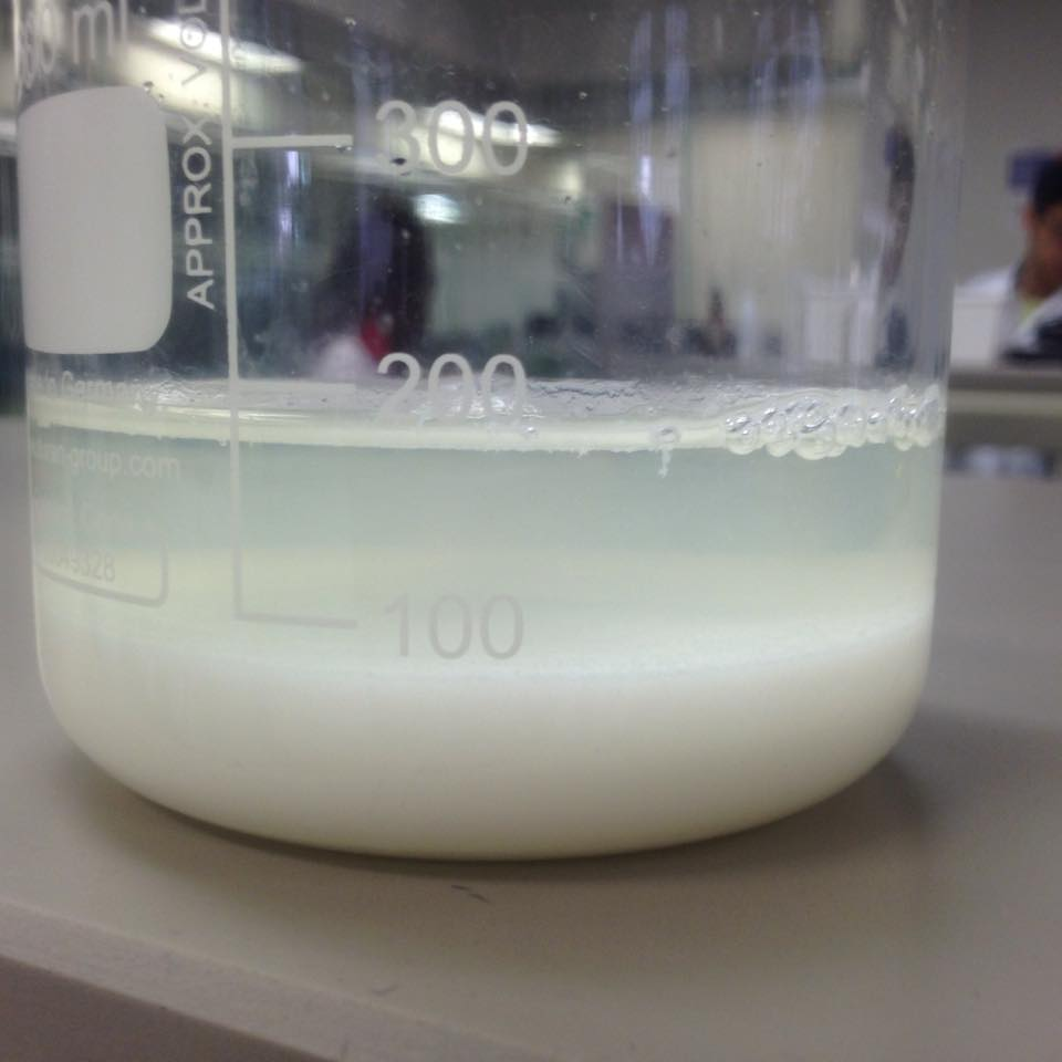 Precipitación de caseína de la leche con ácido clorhídrico. Laboratorios, Tecnológico de Monterrey Campus Ciudad de México.